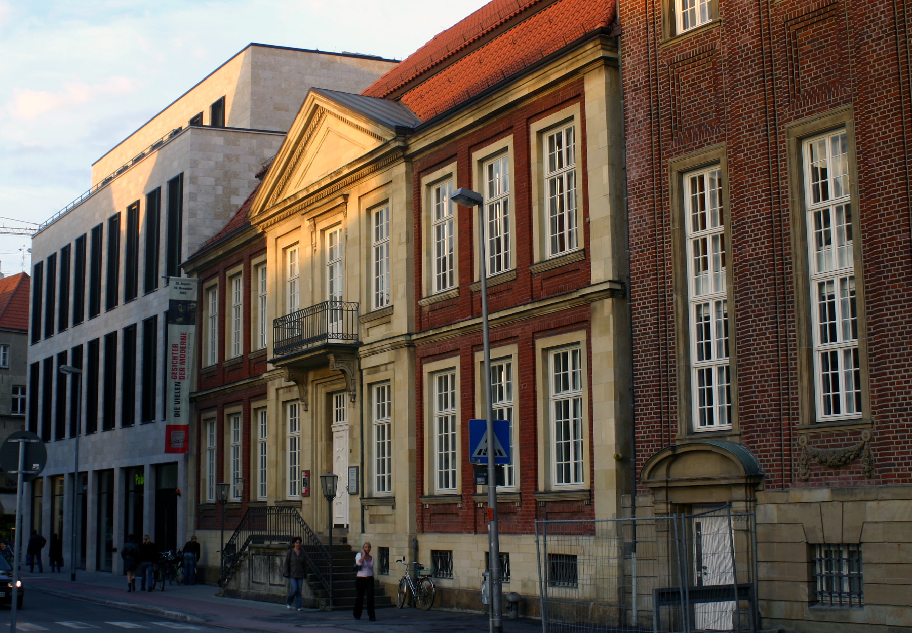 Münster, Germany, Druffelscher Hof, Sitz des Graphikmuseum Pablo Picasso Münster